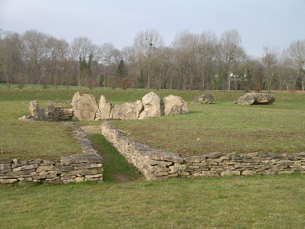 Dolmen de la Pierre Tourneresse à Cairon (Calvados)